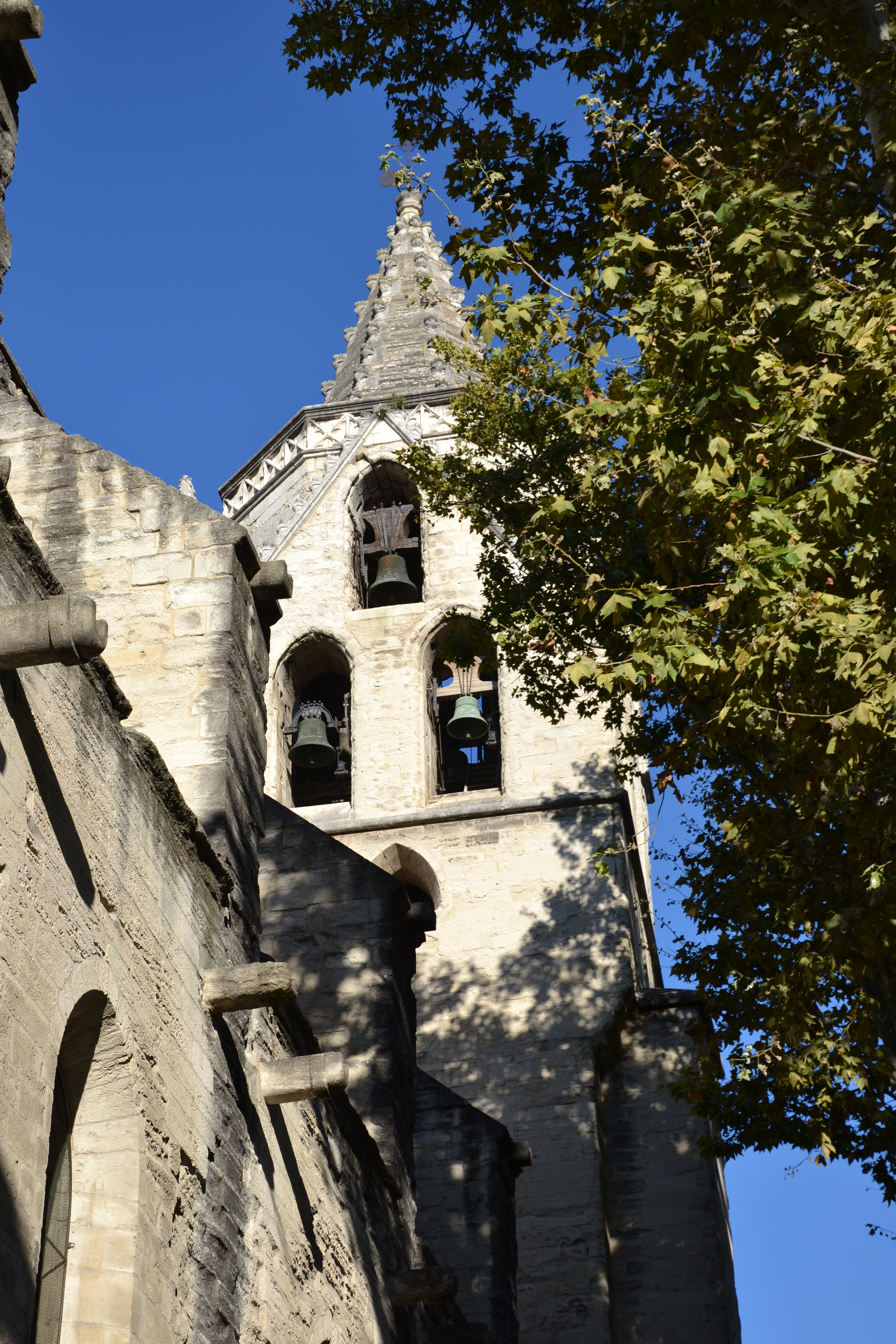 Collégiale Saint-Didier (Classé) .